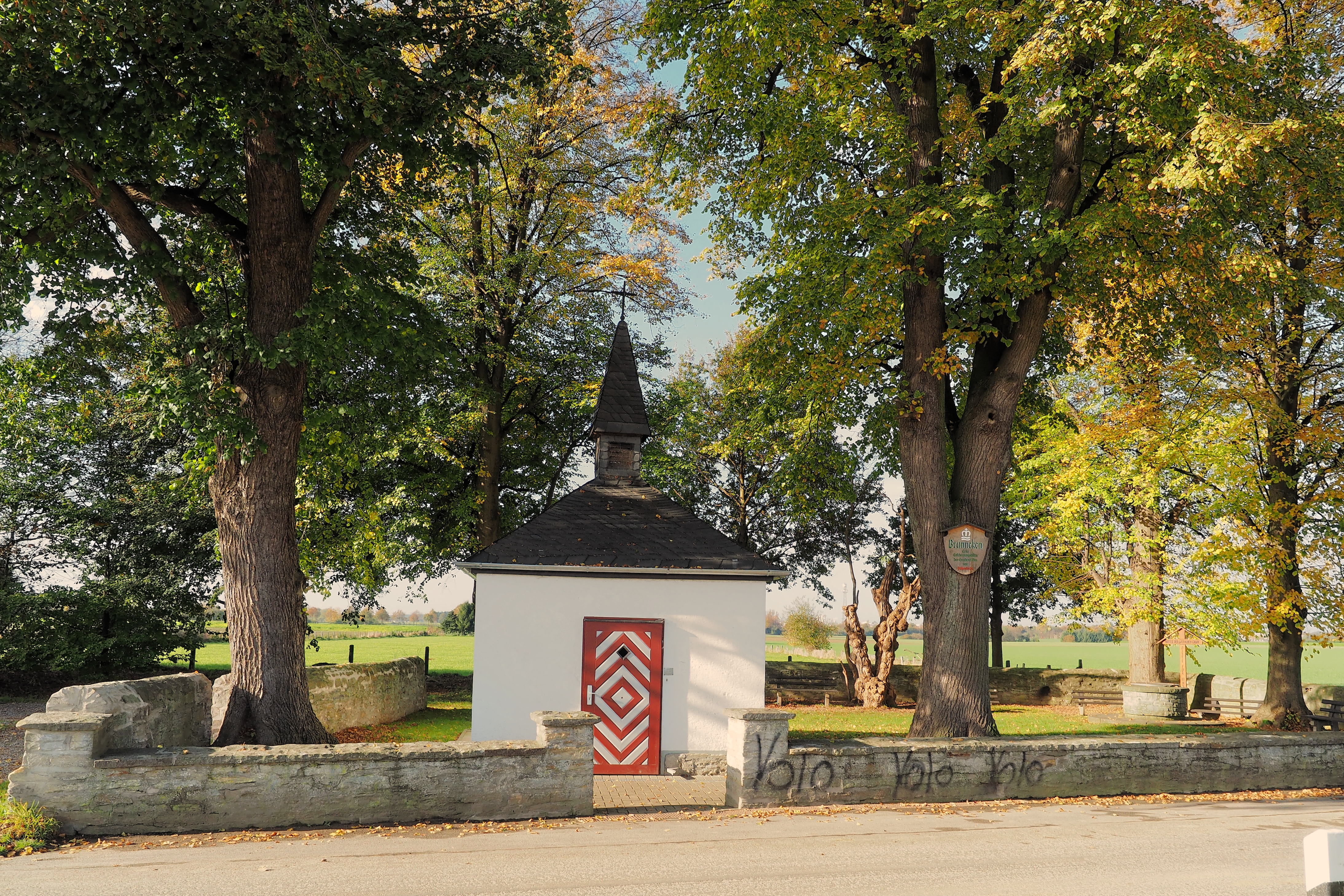 Das Brünneken 2014 (Wallfahrtskapelle mit Brunnen bei Bökenförde)